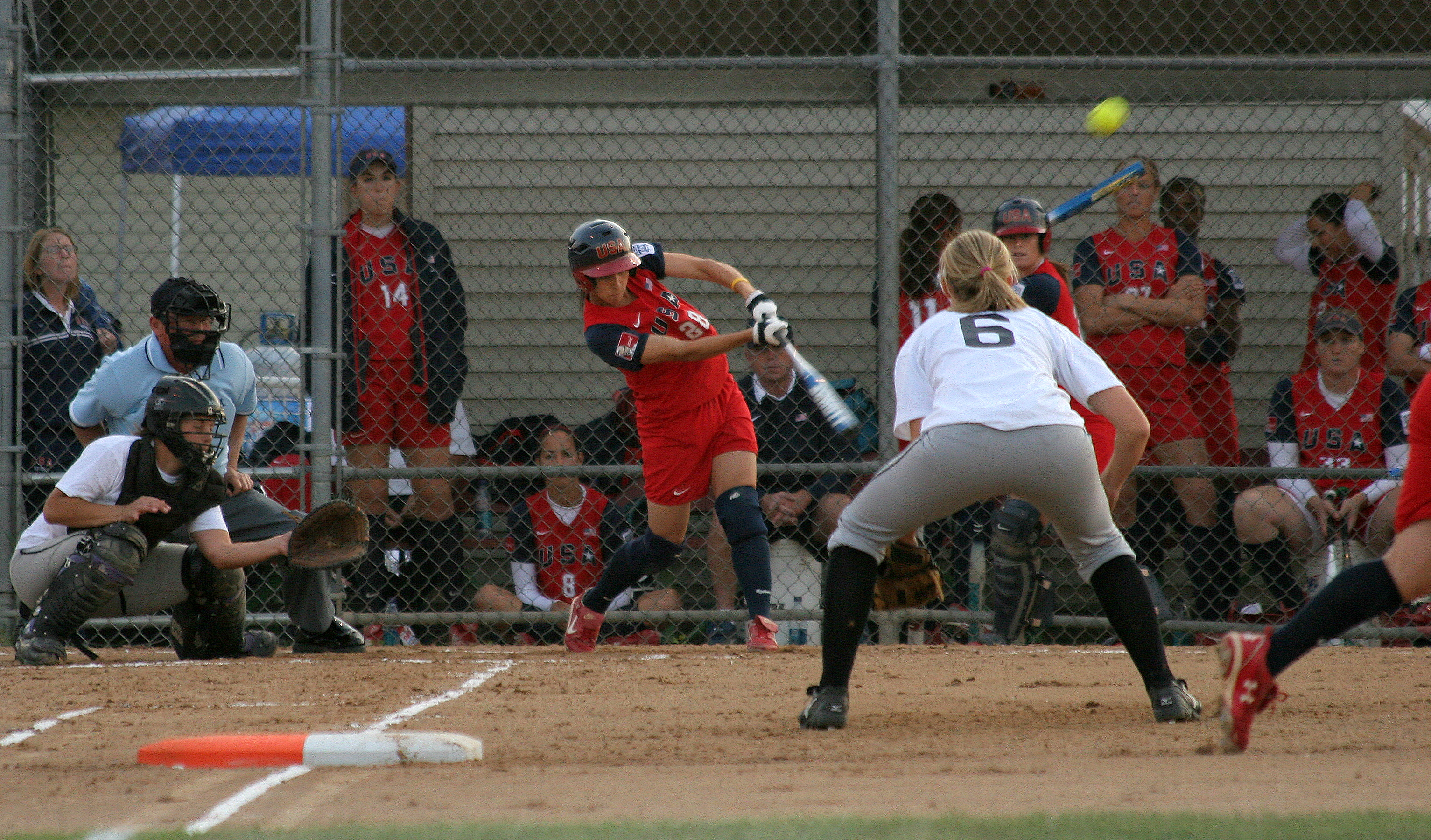 3 RBIs for Andrea Duran